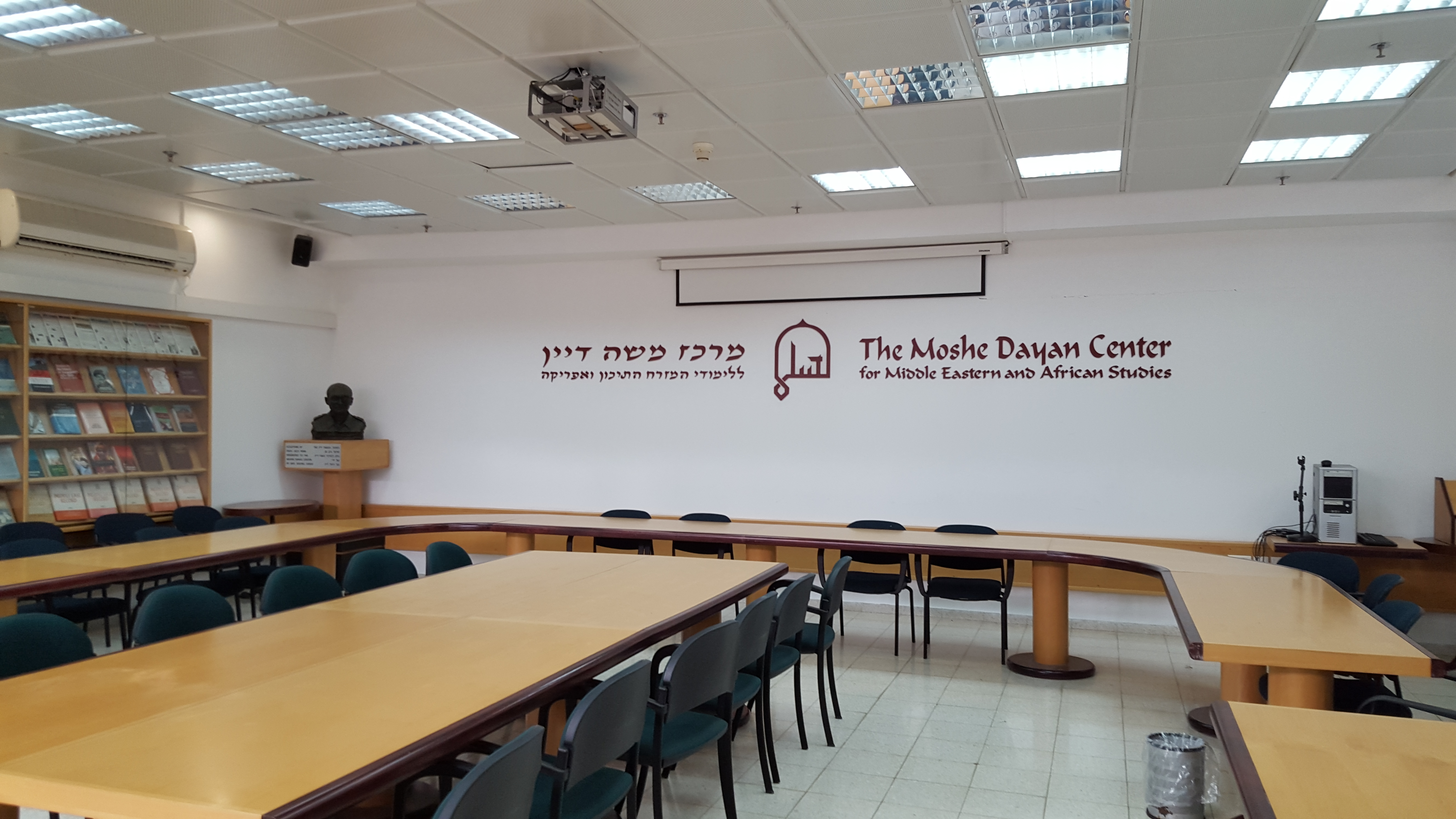 The conference room of the Moshe Dayan Center for Middle Eastern and African Studies